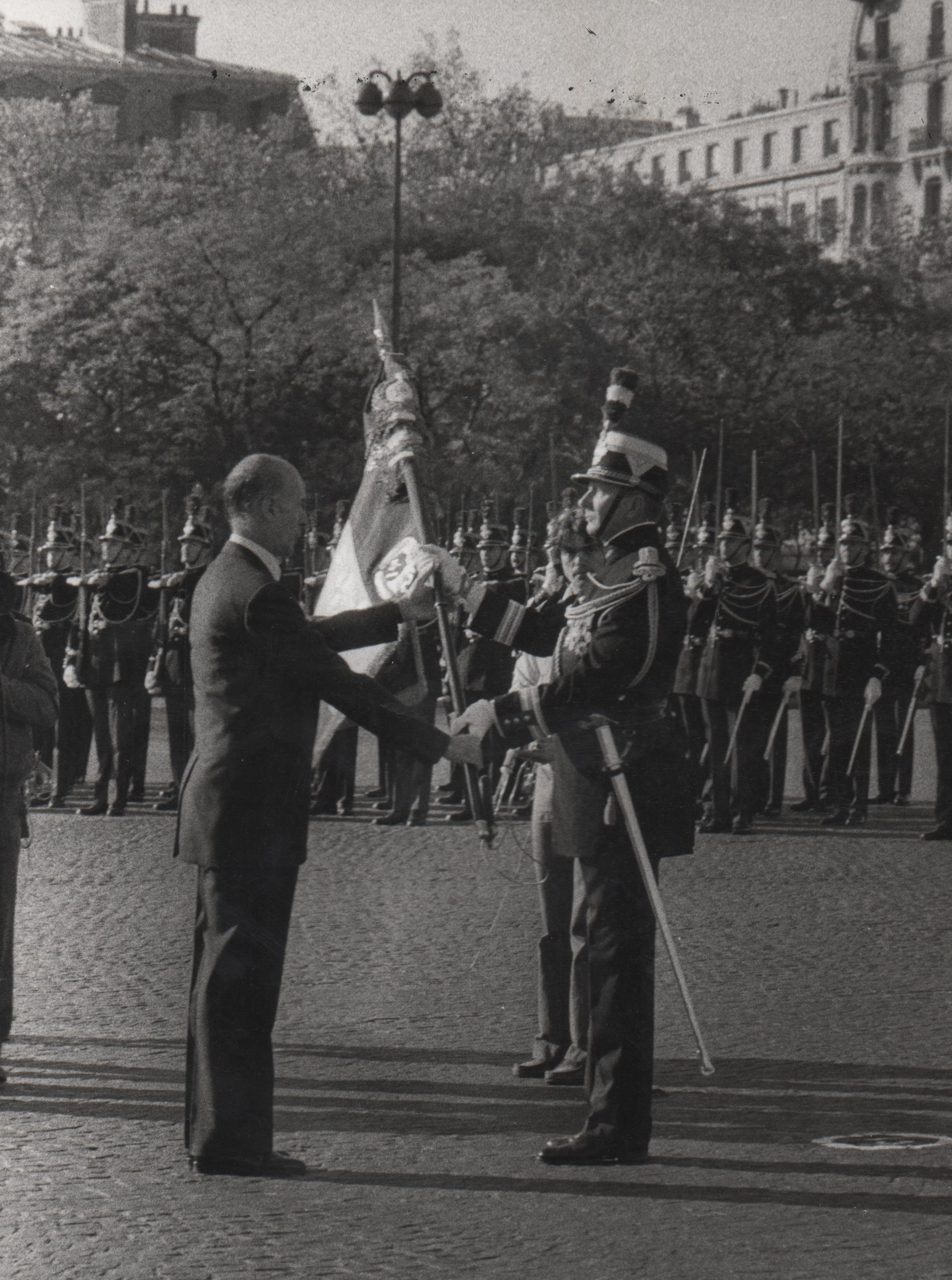 Remise du Drapeau du 1° Régiment d'Infanterie de la Garde Républicaine à son premier Chef de Corps le Lt Cl GERARDIN, par Mr Giscard d'Estaing Président de la République